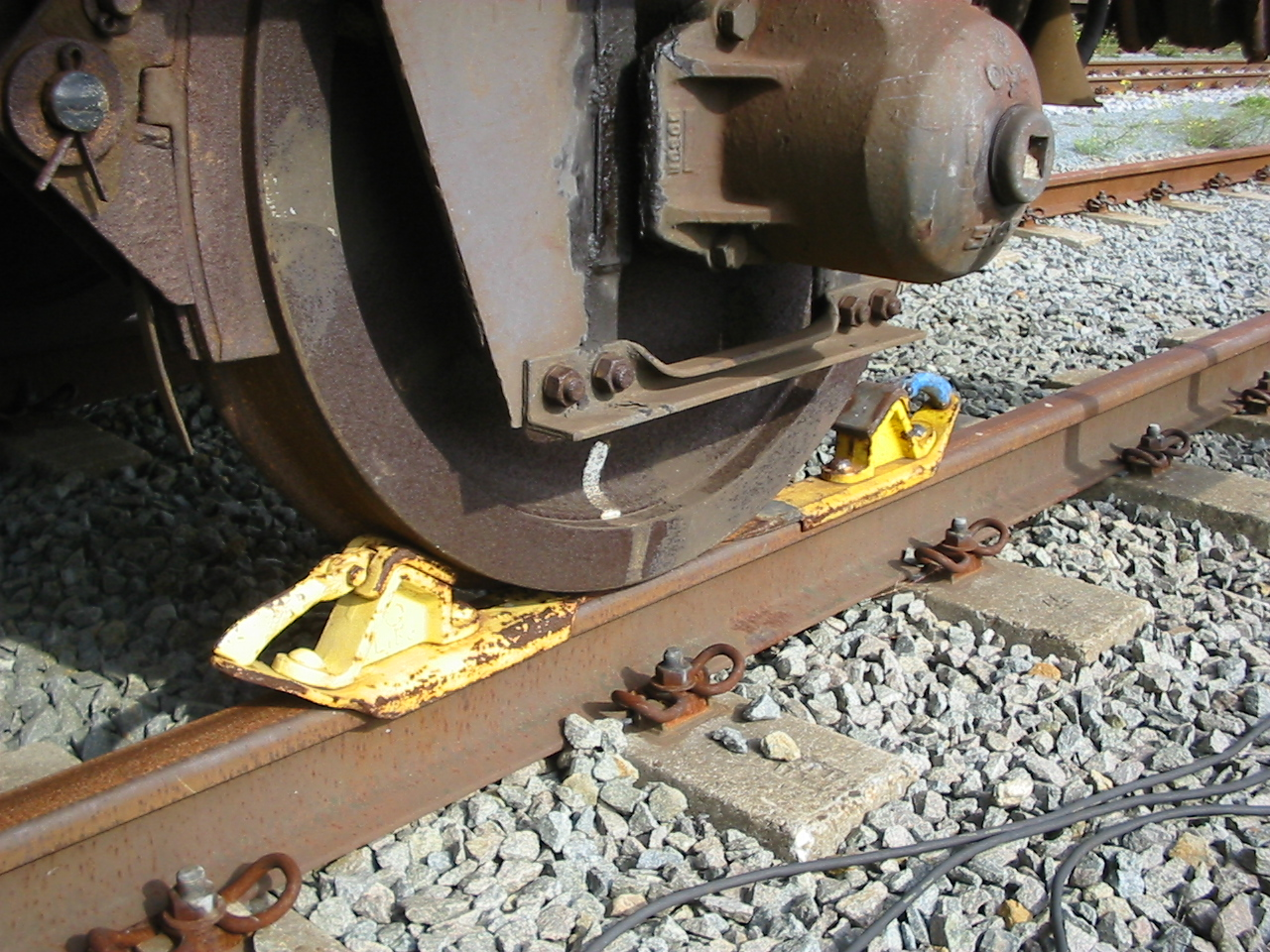 Remslof op spoor 34 te Amersfoort